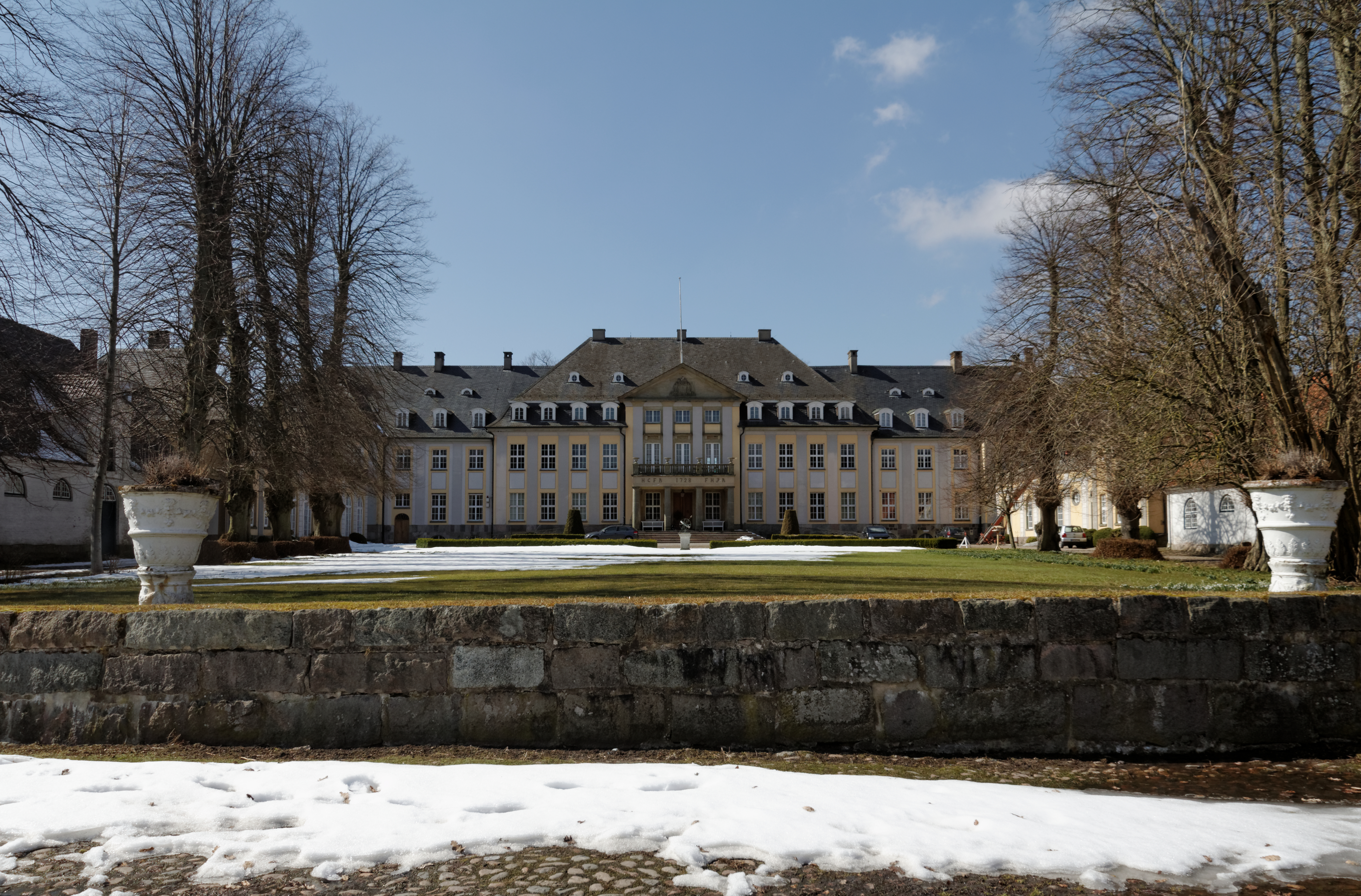 Gut Altenhof; Herrenhaus, bis Ende 2014 Hotel